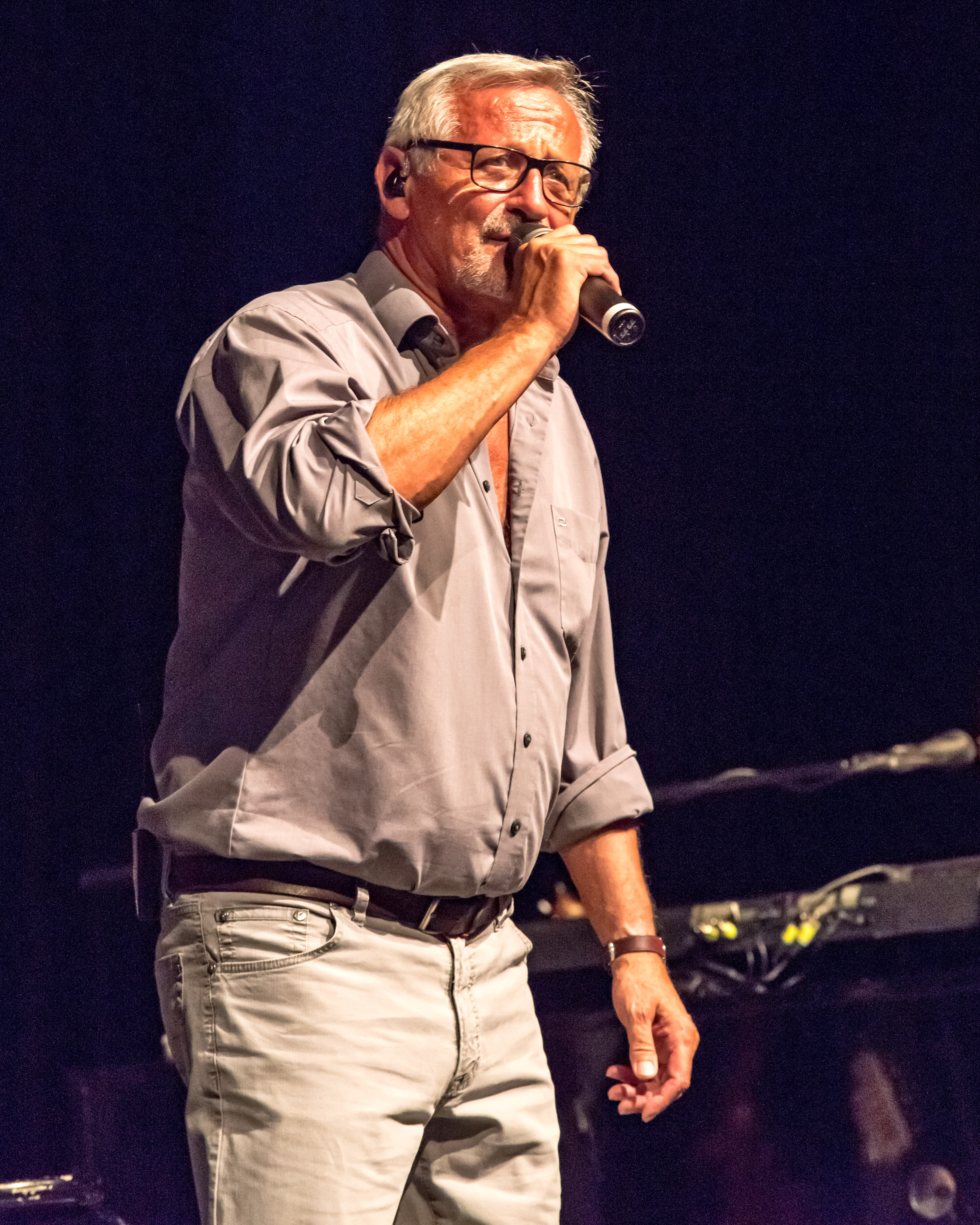 Bilder vom Zelt Musik Festival 2017 in Freiburg im Breisgau Konstantin Wecker (ZMF 2017) am 17.07.2017